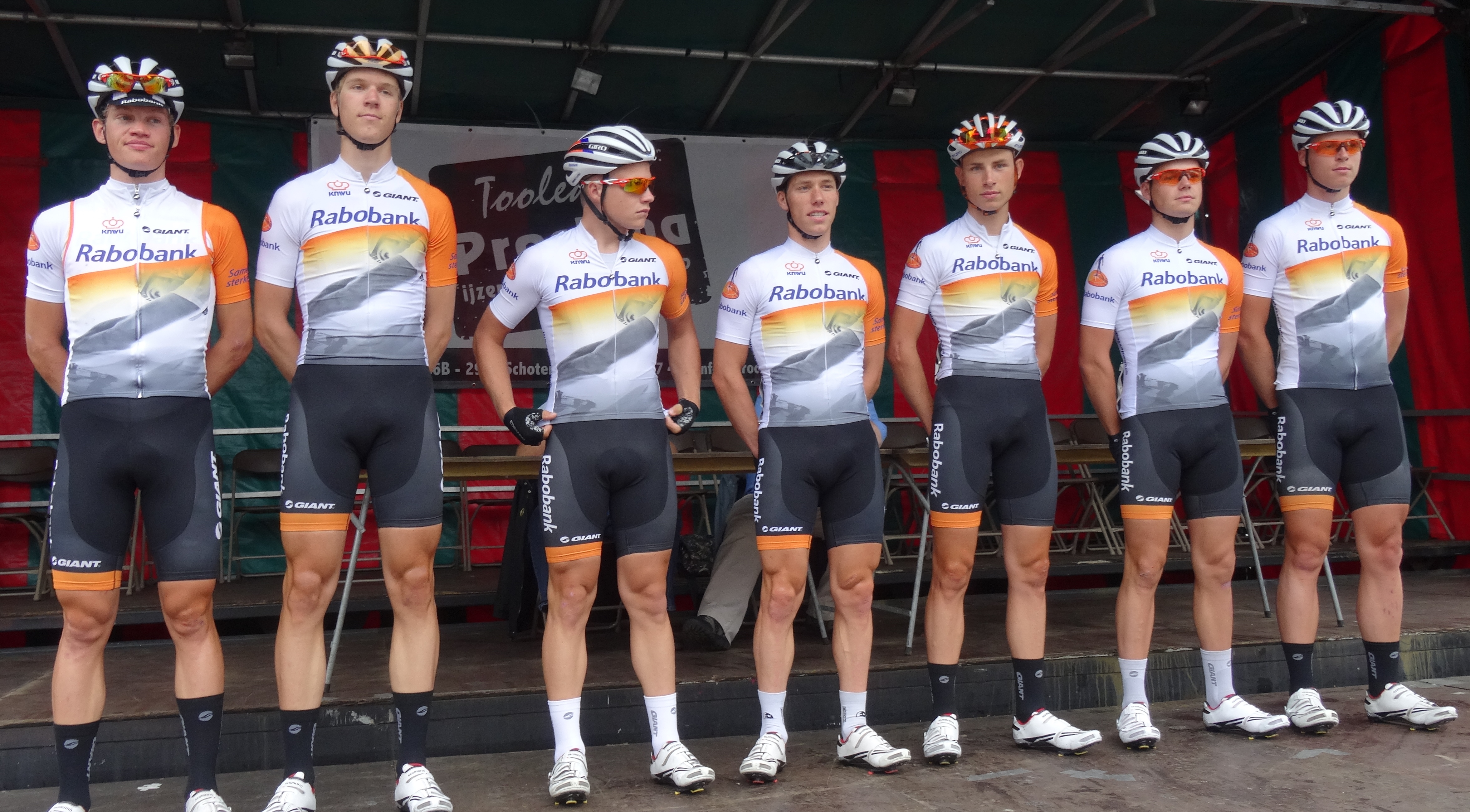 Reportage photographique réalisé le dimanche 10 août à l'occasion du départ et de l'arrivée de la Flèche du port d'Anvers 2014 à Merksem (Anvers), Belgique.